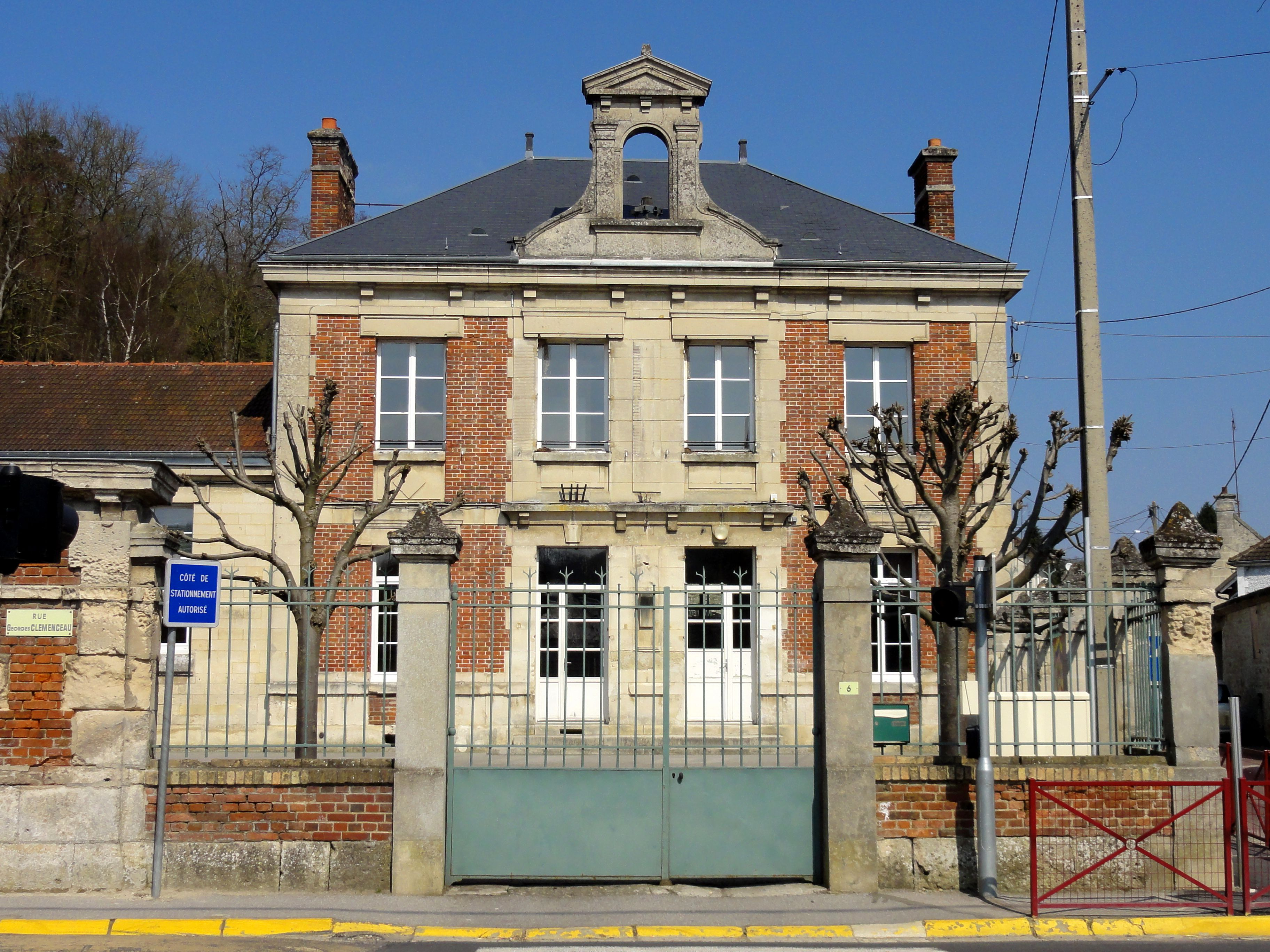 La mairie de Béthisy-Saint-Martin.